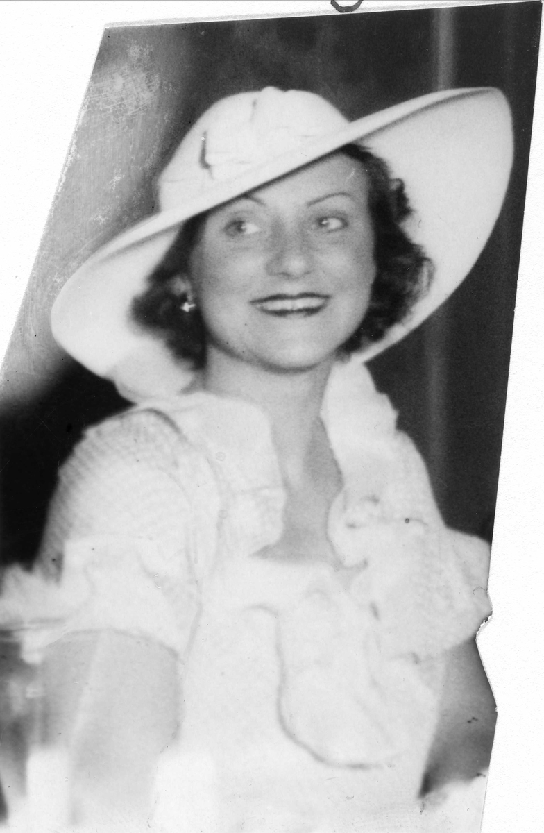 Skuespilleren Lillebil Ibsen